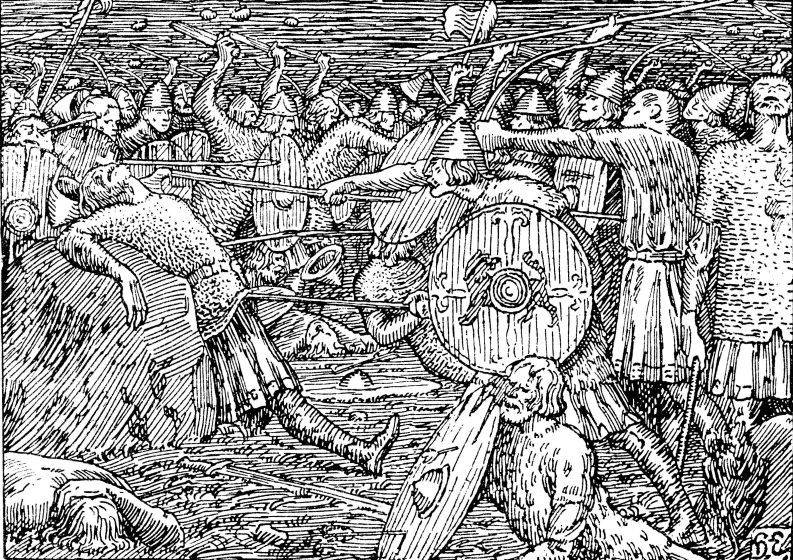 Halfdan Egedius: Illustration for Olav den helliges saga. Snorre 1899-edition. «Kong Olavs Fald.» nb: «Kong Olavs fall.» nn: «Kong Olav fell.»